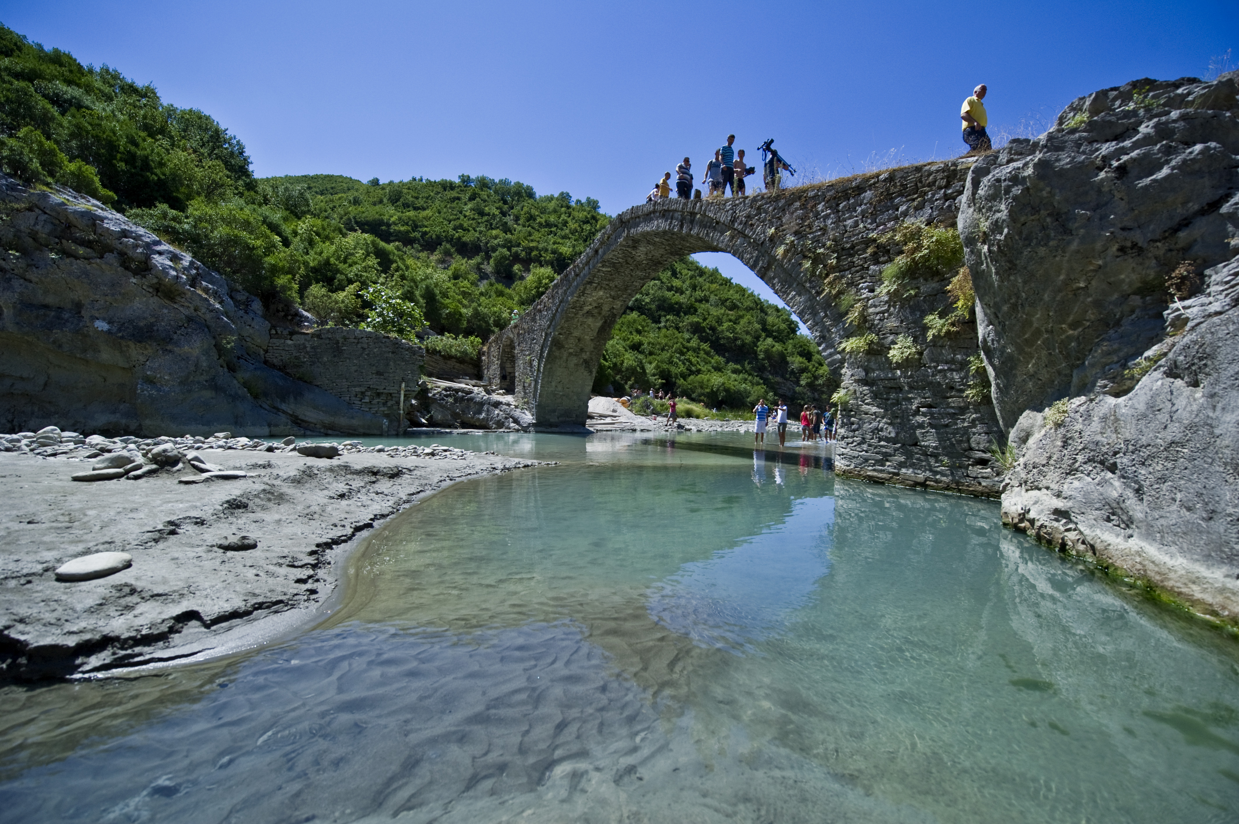 Ura e Katiut